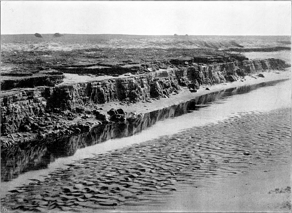 Prielabsturz in Neuwerk (Ebbe)